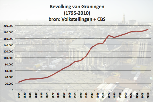 Bevolking van Groningen (gemeente) 1795 t/m 2010